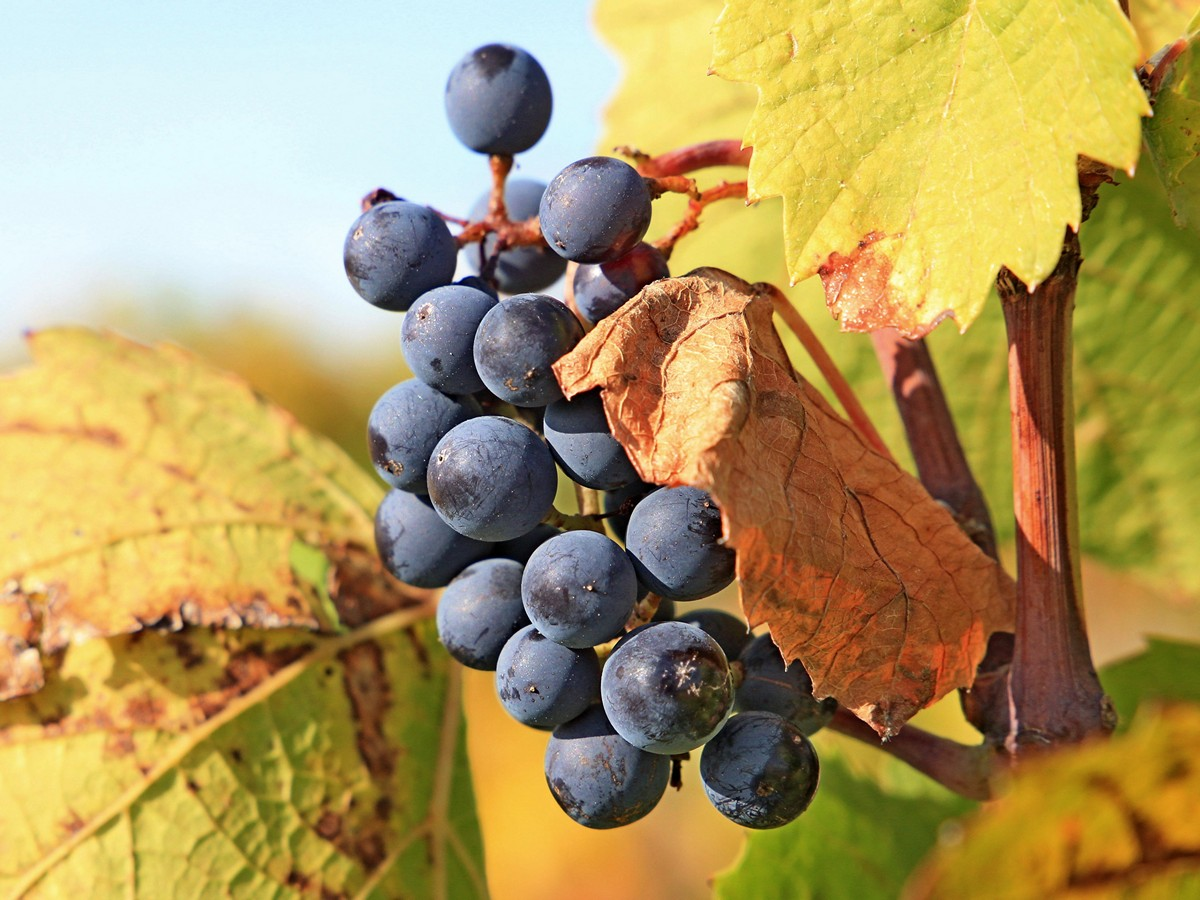 Weintraube für Beaujolaiswein in Frankreich